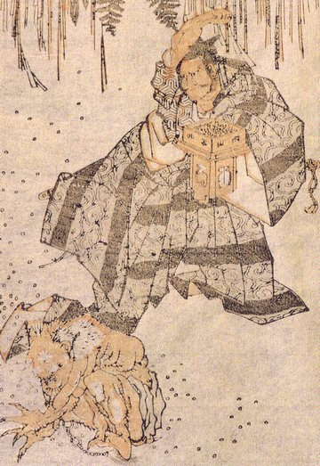 Setsubun No Oni (節分の鬼) from Hokusai Manga (北斎漫画 四編)